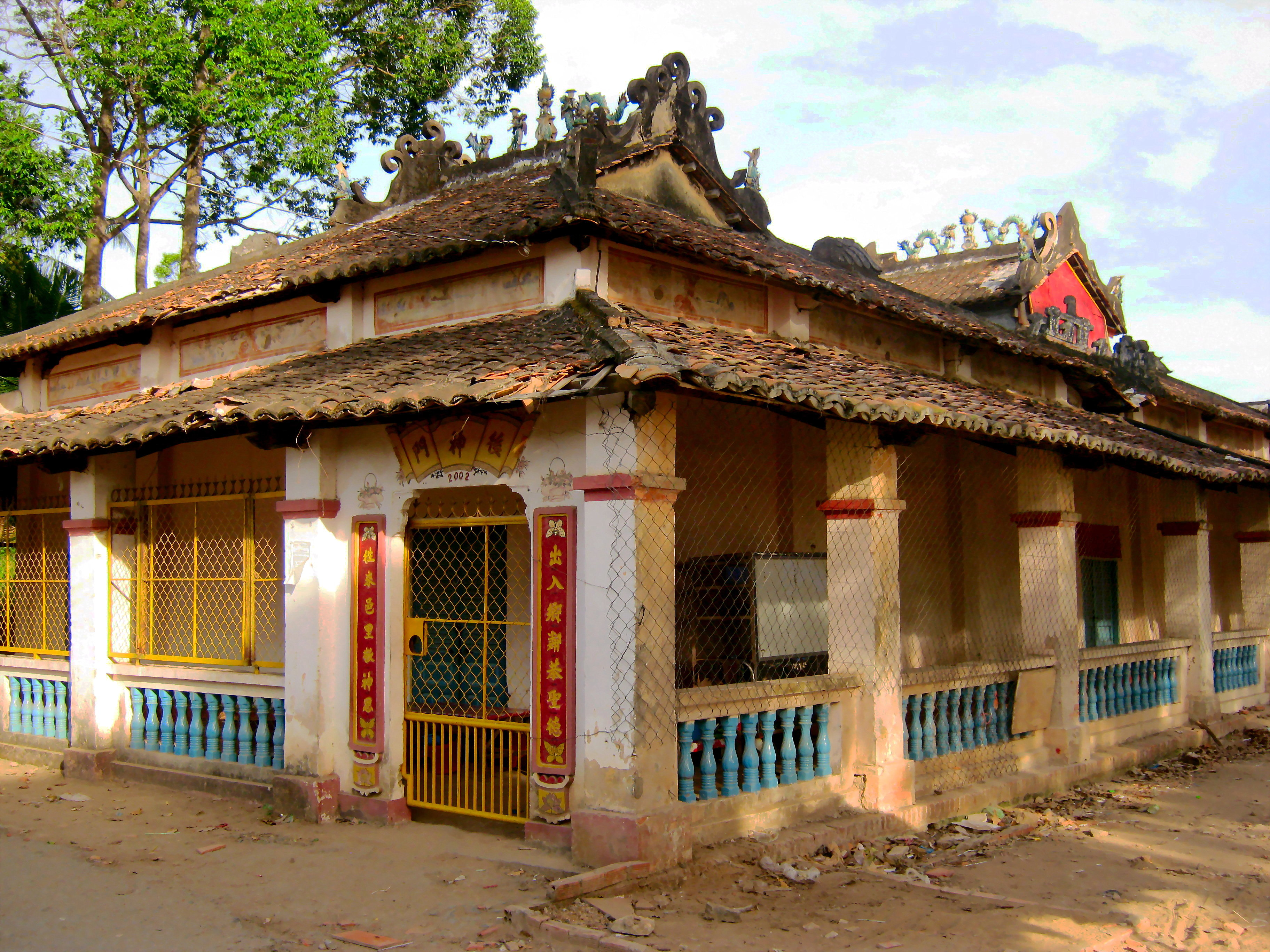 Đình Thành Lợi tọa lạc tại ấp Thành Tâm, xã Thành Lợi, huyện Bình Tân, tỉnh Vĩnh Long, Việt Nam